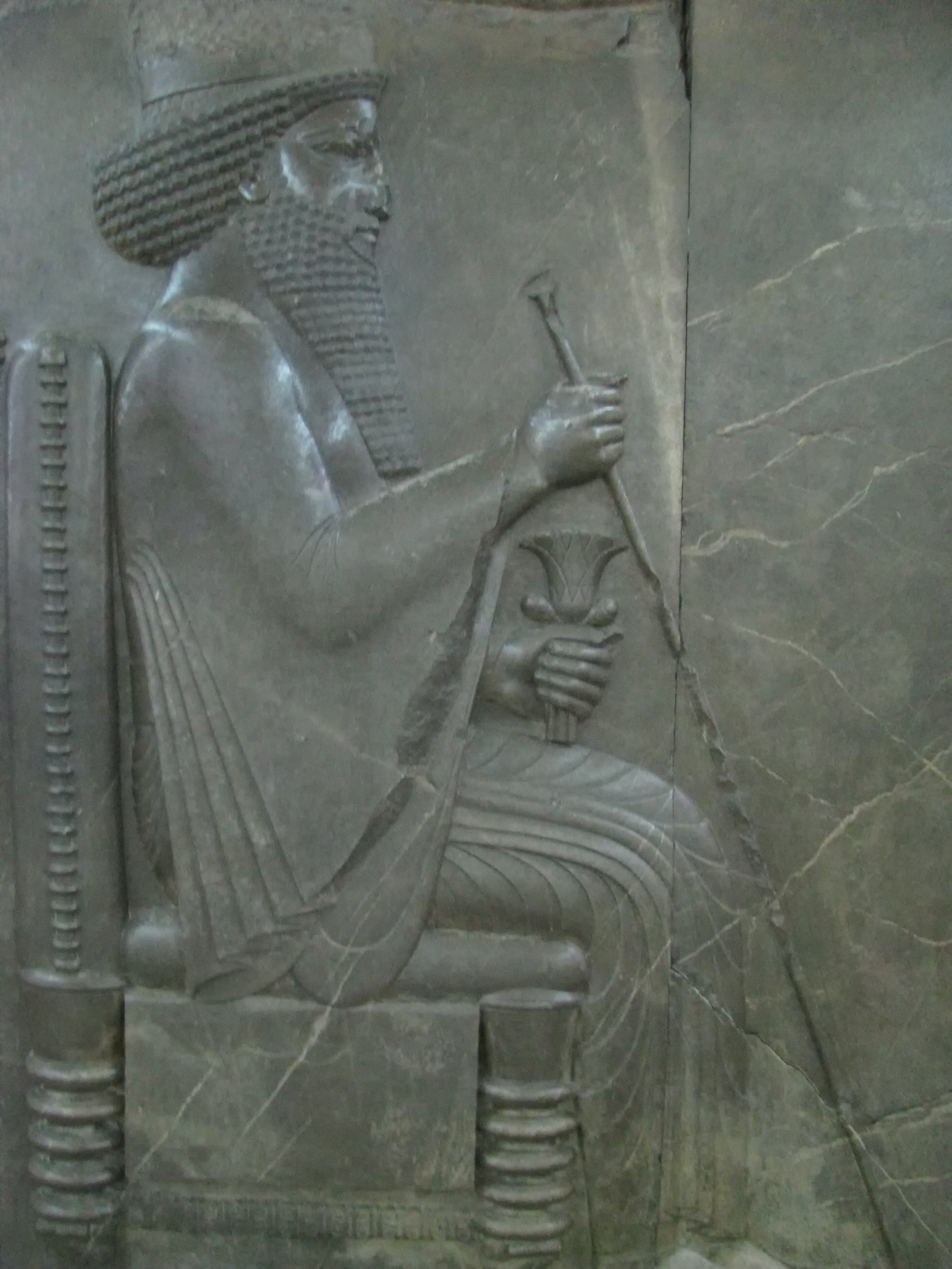 تصویر داریوش بزرگ در نقش بار عام داریوش. کشف‌شده در تخت جمشید. موجود در موزهٔ ایران باستان